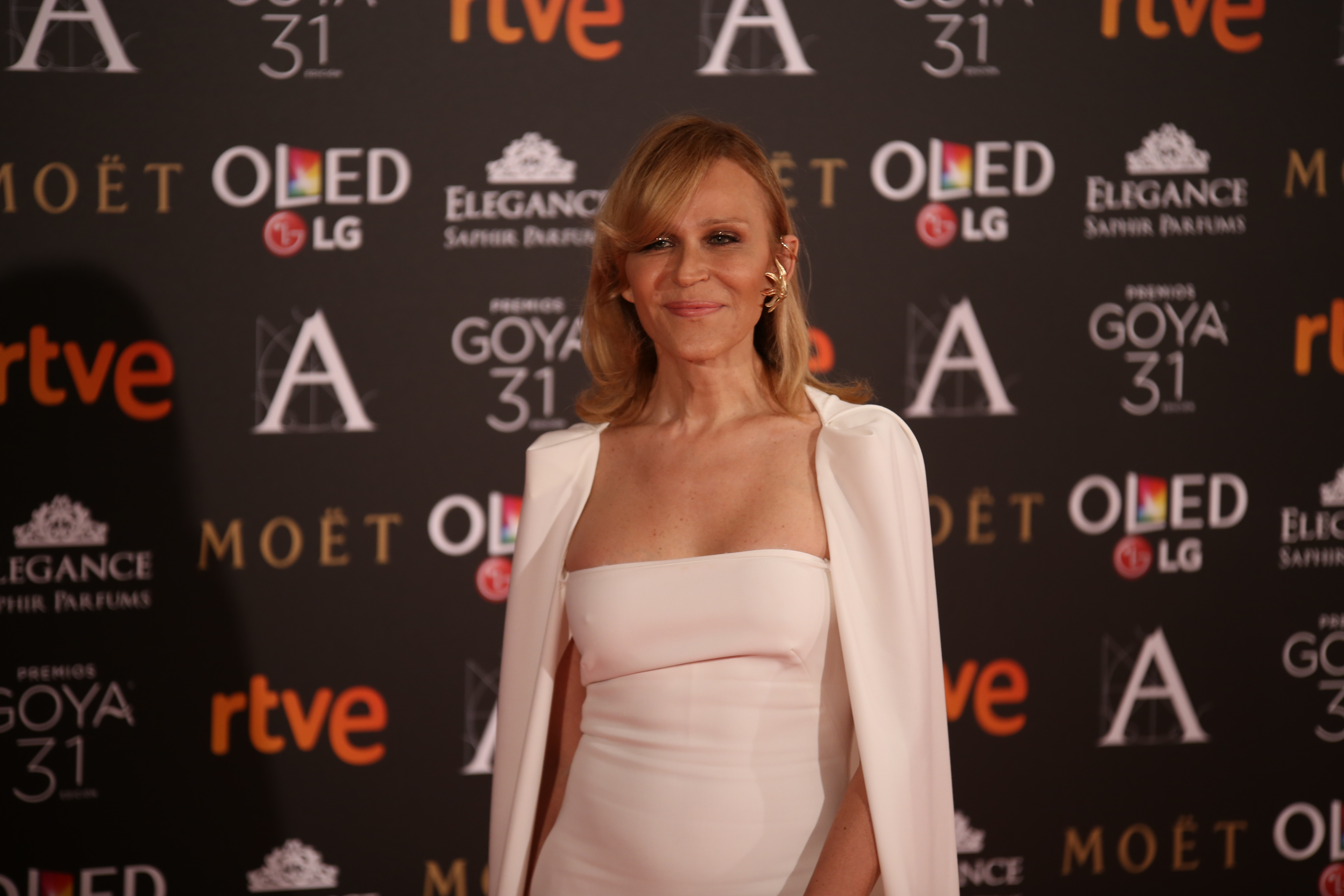 Premios Goya 2017